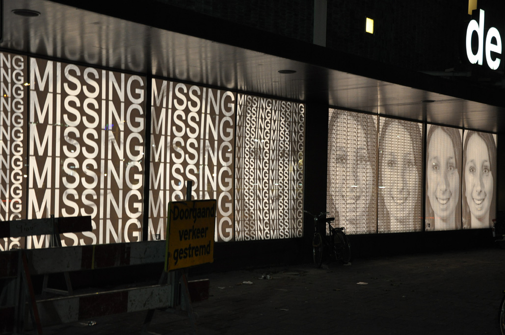 Lichtkunst: GLOW (Eindhoven), Ralph Ueltzhoeffer: "Beeing Public" - "Missing" (2009), Lichtkunst in den Schaufenstern des Kaufhauses "De Bijenkorf" (Eindhoven).